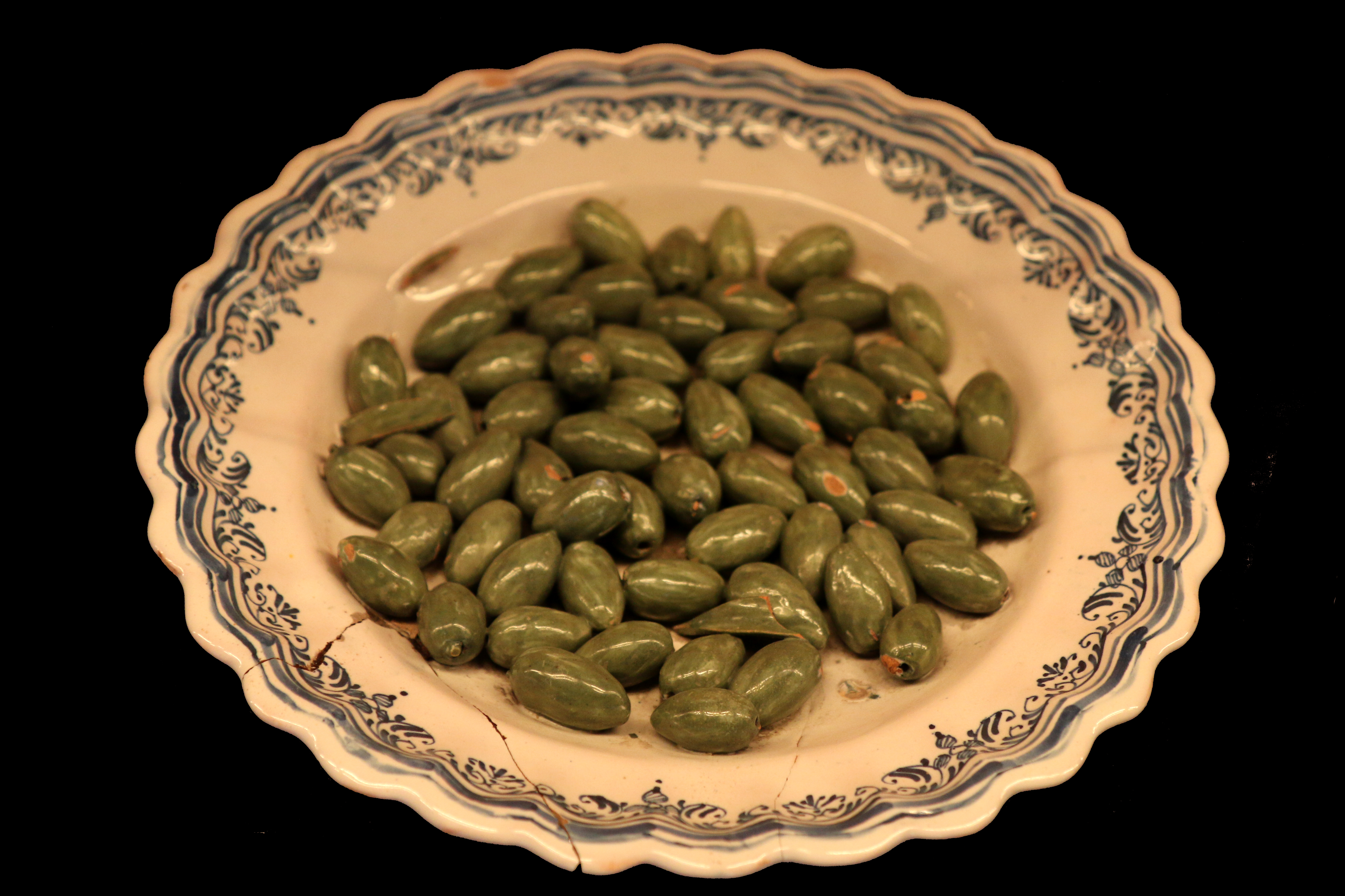 Assiette avec olives en relief. Varages (?), fin du XVIII° siècle; Musée des beaux-arts de Narbonne.